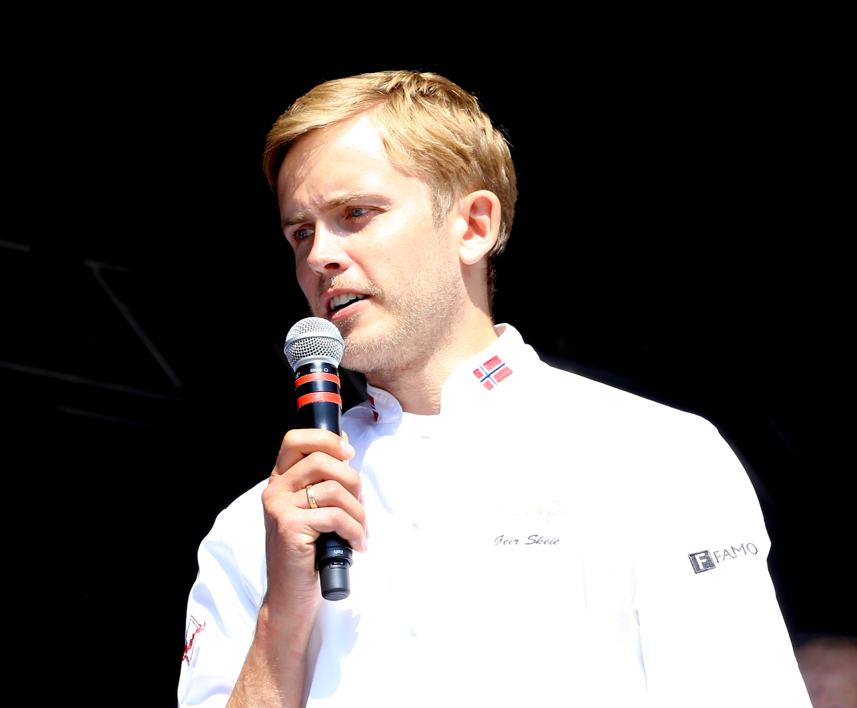 Geir Skeie under Gladmat 2014